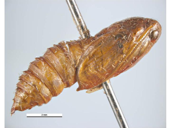 Ctenopseustis herana pupa, male